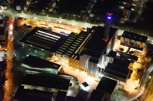 FRANKFURT AM MAIN 27.02.2016 Nachtluftbild des MHKW - Müllheizkraftwerk Frankfurt am Main im Bundesland Hessen. Das Kraftwerk der FES Frankfurter Entsorgungs- und Service GmbH an der Heddernheimer Landstraße versorgt den Stadtteil Nordweststadt mit Fernwärme.